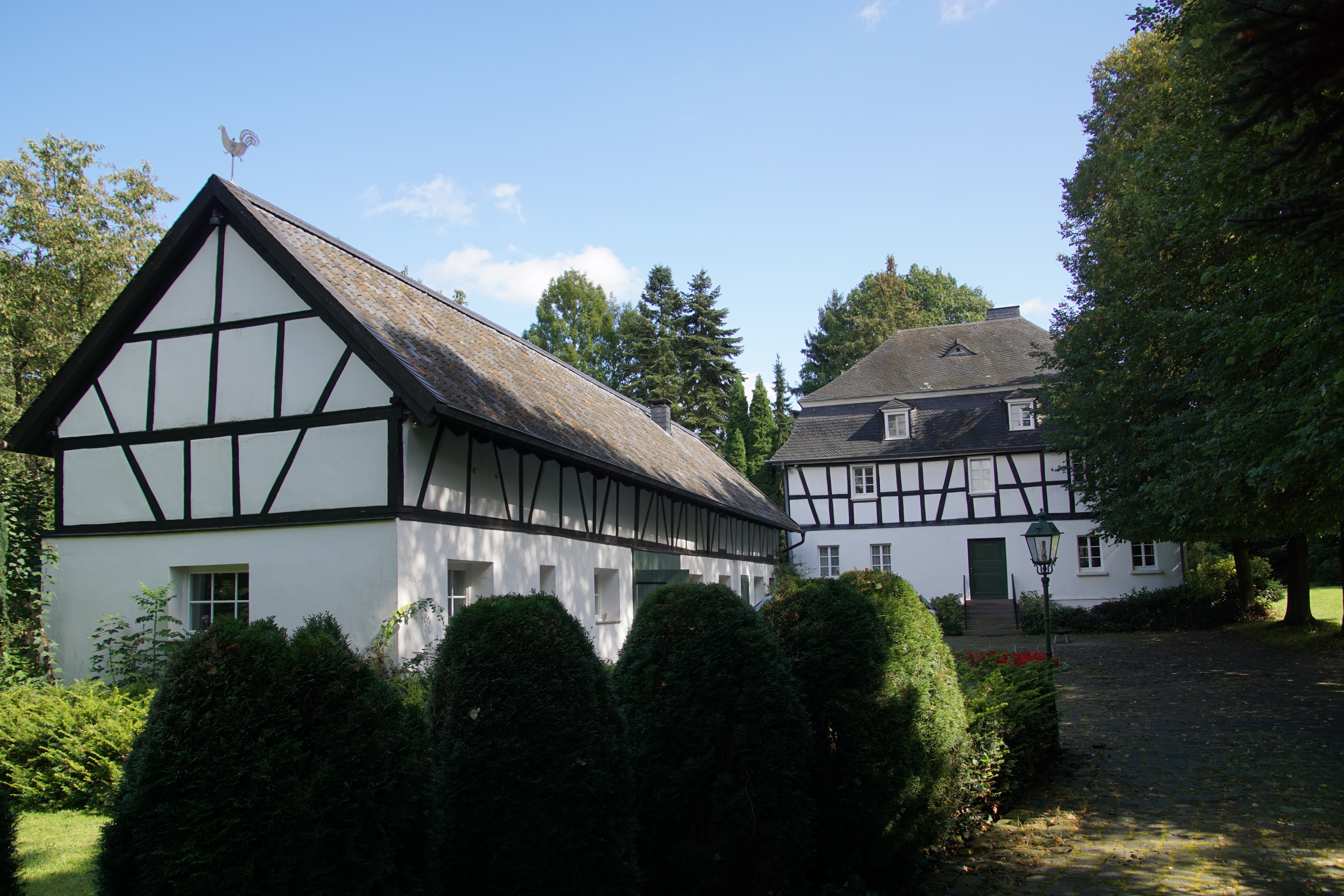 Denkmalgeschützter Marxhof, Stieldorf-Oelinghoven (Königswinter), Zur Heide 36 This is a photograph of an architectural monument. 265